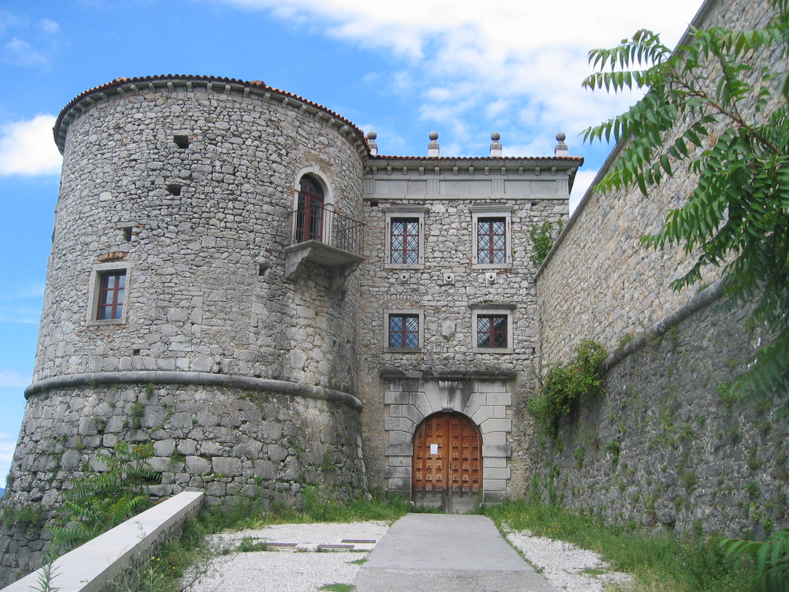 Banik (Rihemberk) castle, Slovenia